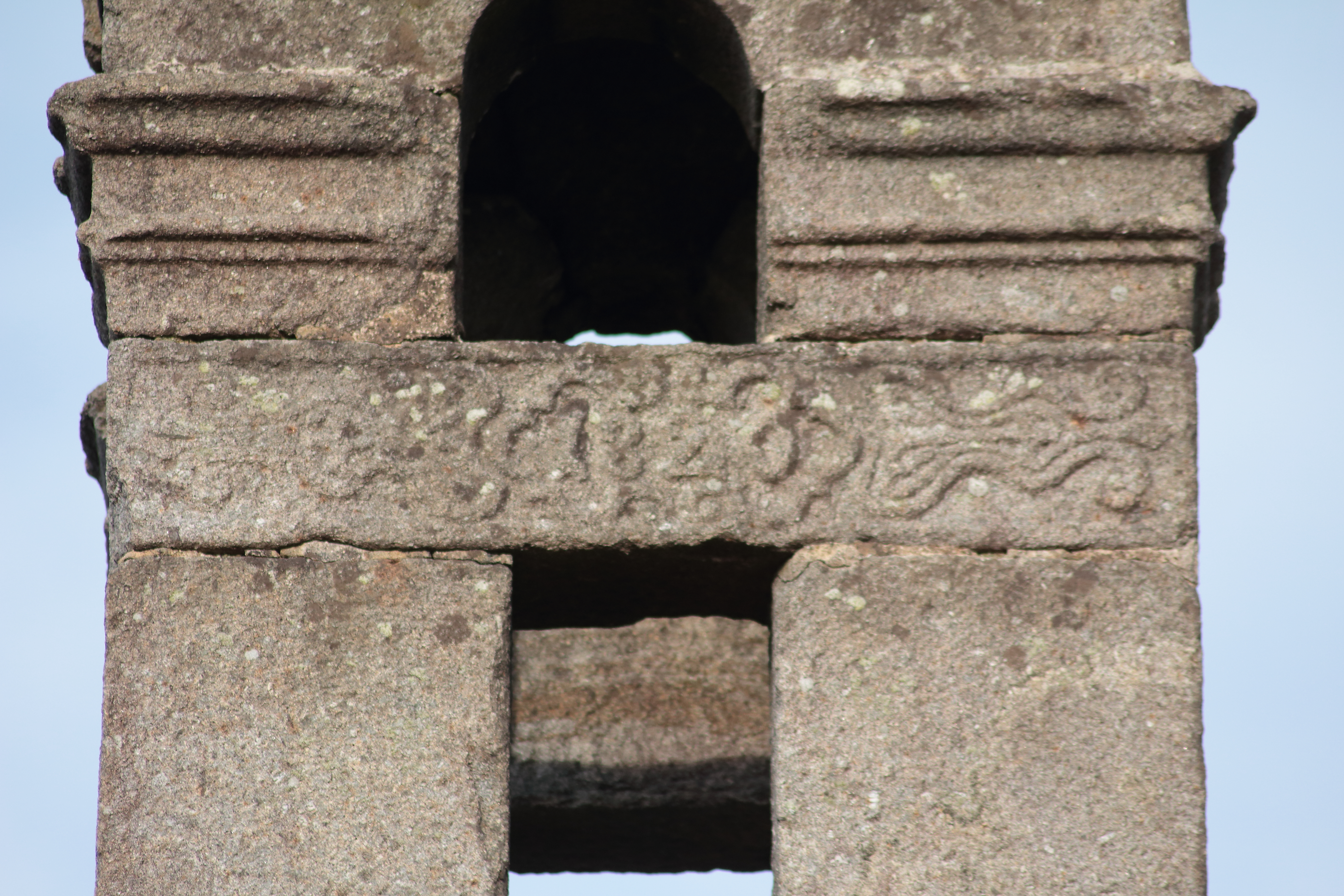 Détail du clocher de la chapelle du Mont-Saint-Michel-de-Brasparts, Finistère, Bretagne, France. L'inscription porte la date de reconstruction du clocher : 1820.